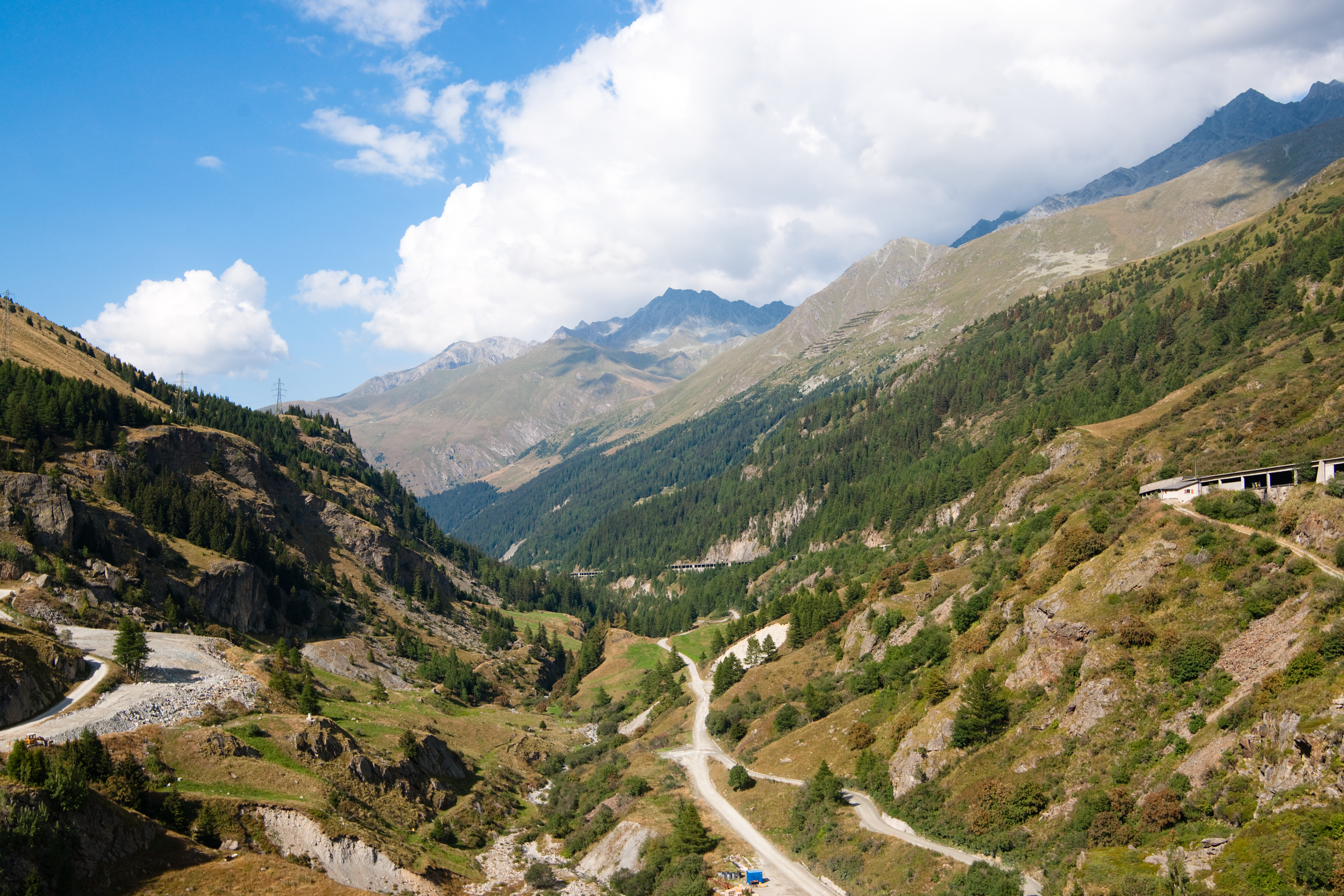 Le Val d'Entremont en Valais depuis le barrage des Toules, Suisse.